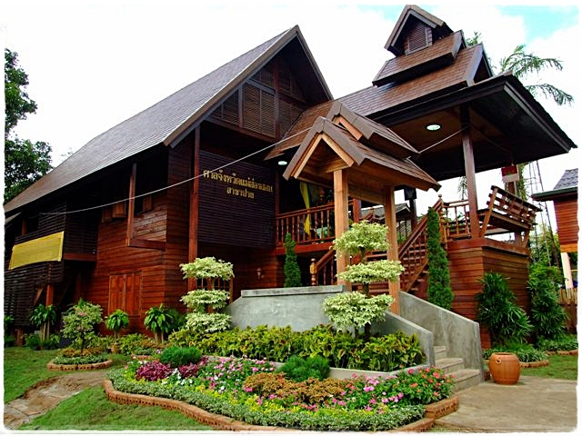 ภาพอาคารศาลจังหวัดแม่ฮ่องสอน สาขาปาย เป็นอาคารเรือนไม้สถาปัตยกรรมแบบล้านนา สร้างเสร็จเมื่อเดือน กันยายน 2552